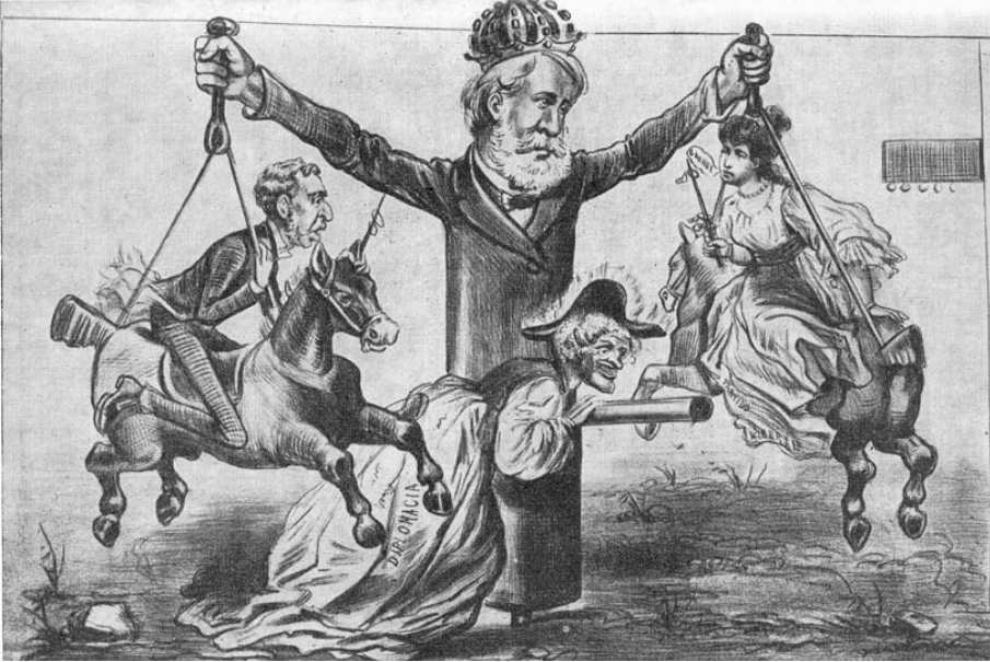 Caricatura do imperador dom Pedro II, publicada em "O Mequetrefe”, 9/1/1878